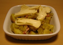 Tartiflette avec lardons